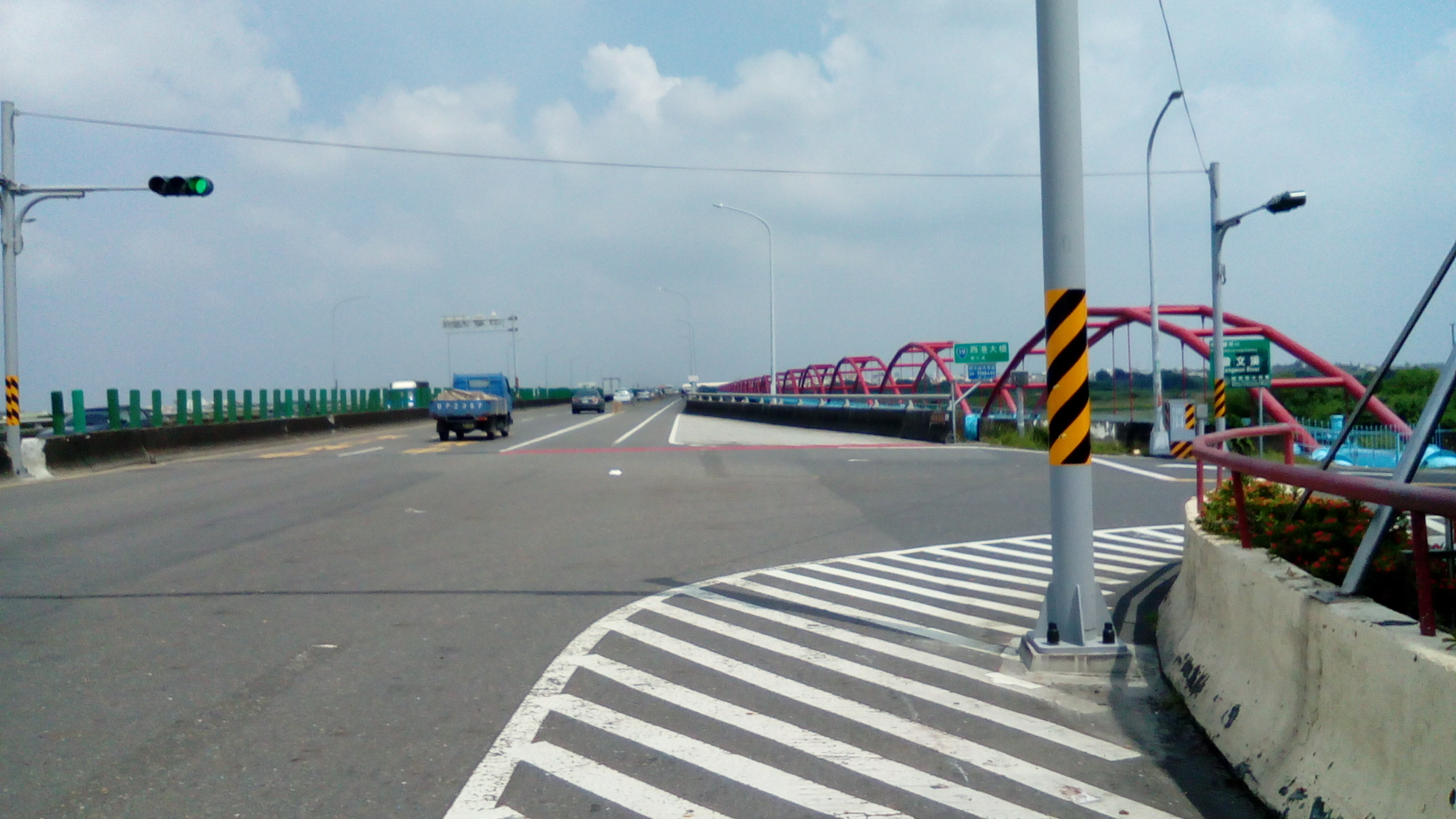 台19線